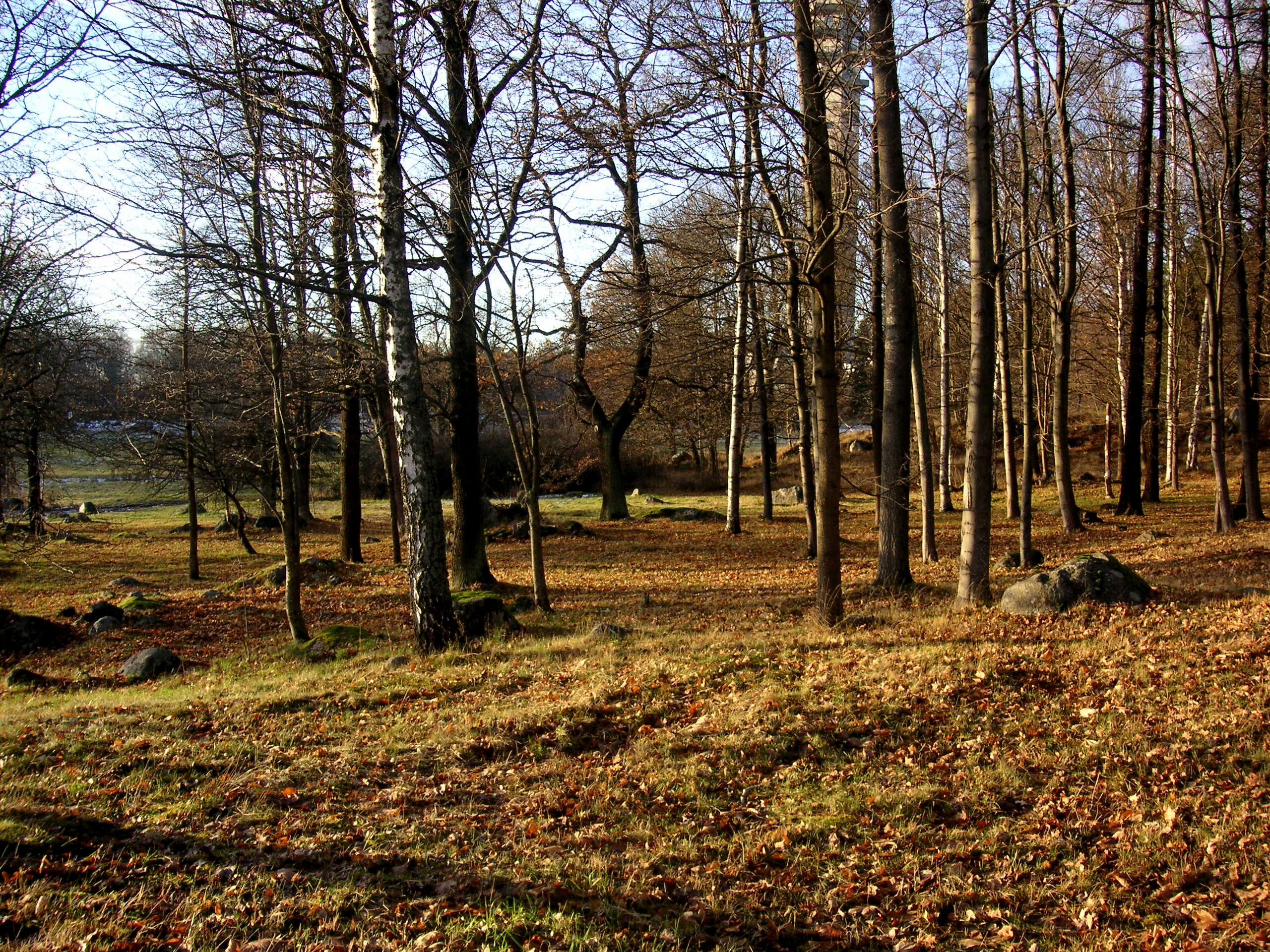 Kaknäs järnåldersgravfält på Gärdet i Stockholm